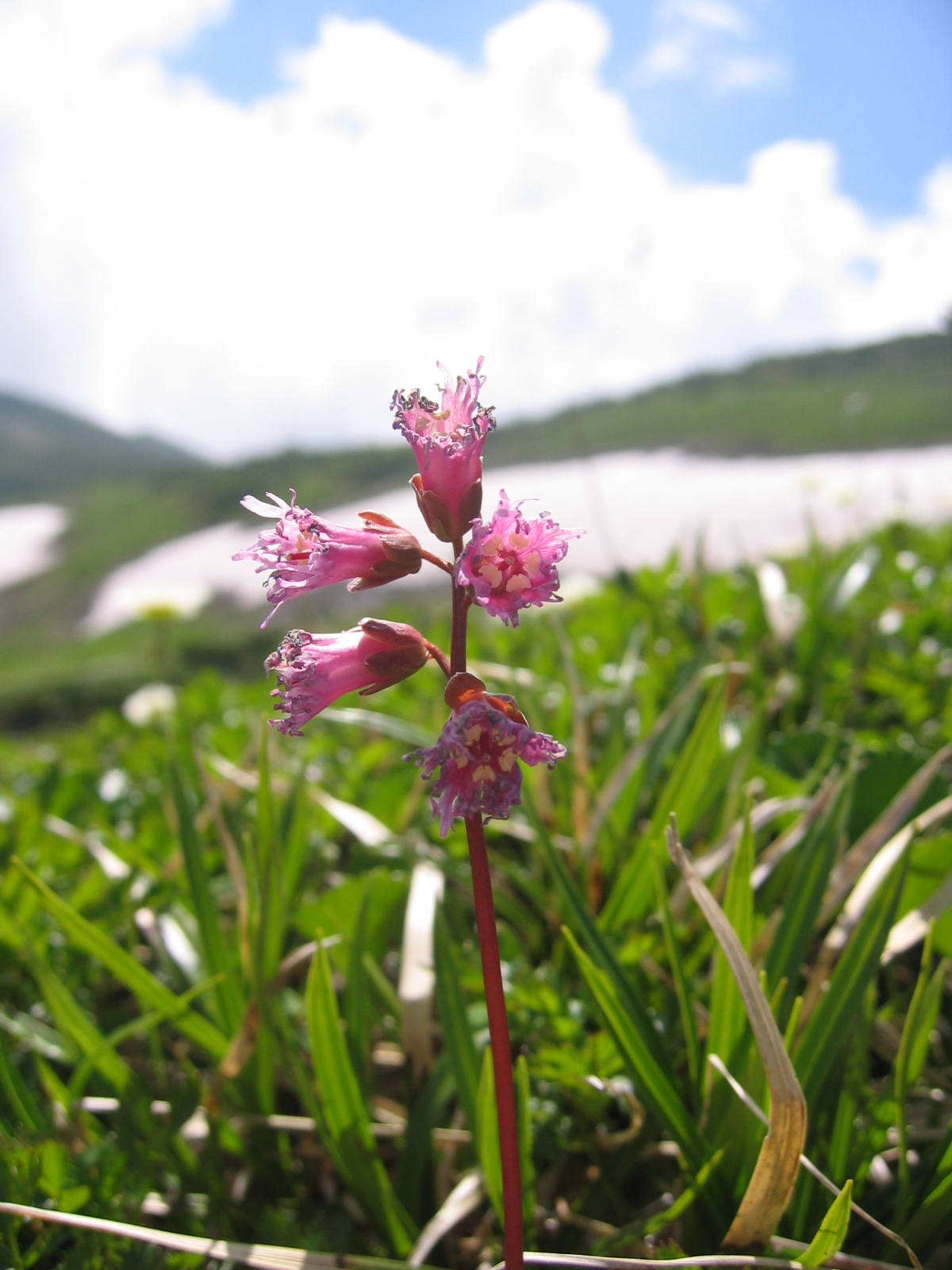 コイワカガミ